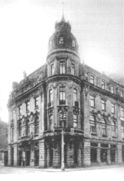 Някогашната сграда на Софийската търговско-индустриална камара (днес на Българско-американската търговска банка) в София на ул. "Славянска" №2